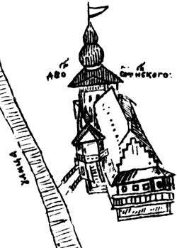 Выява сядзібы Агінскіх на чарцяжы Віцебска 1664 года